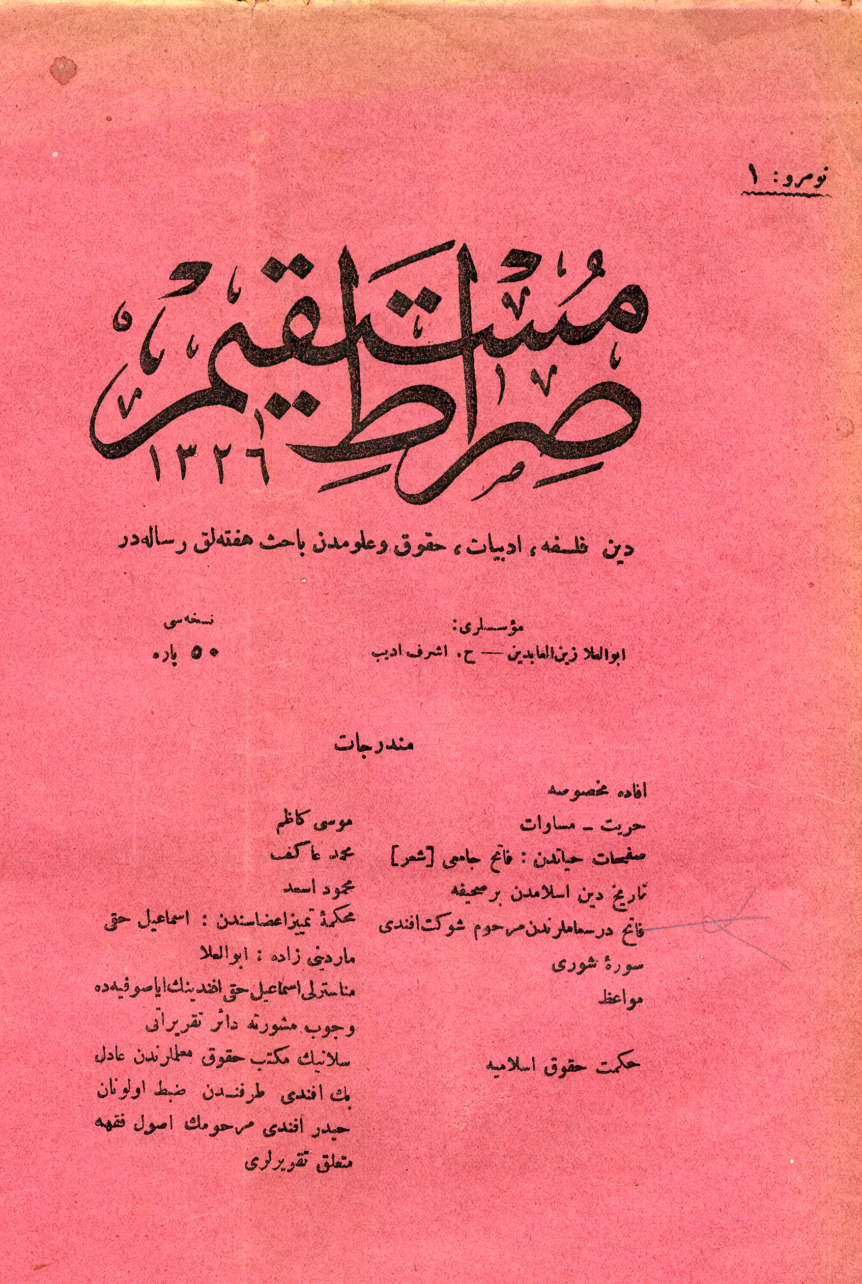 İlk Sayısının Ön Kapağı